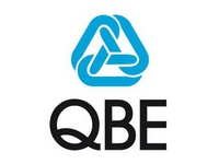 Логотип компанії QBE Україна